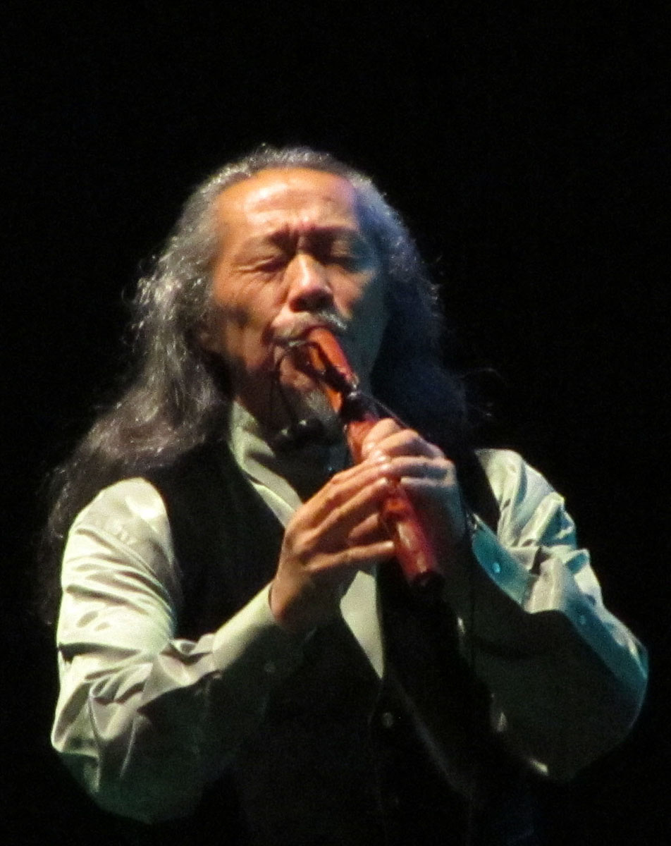 Kitaro concert at Tehran, Iran Oct 2014